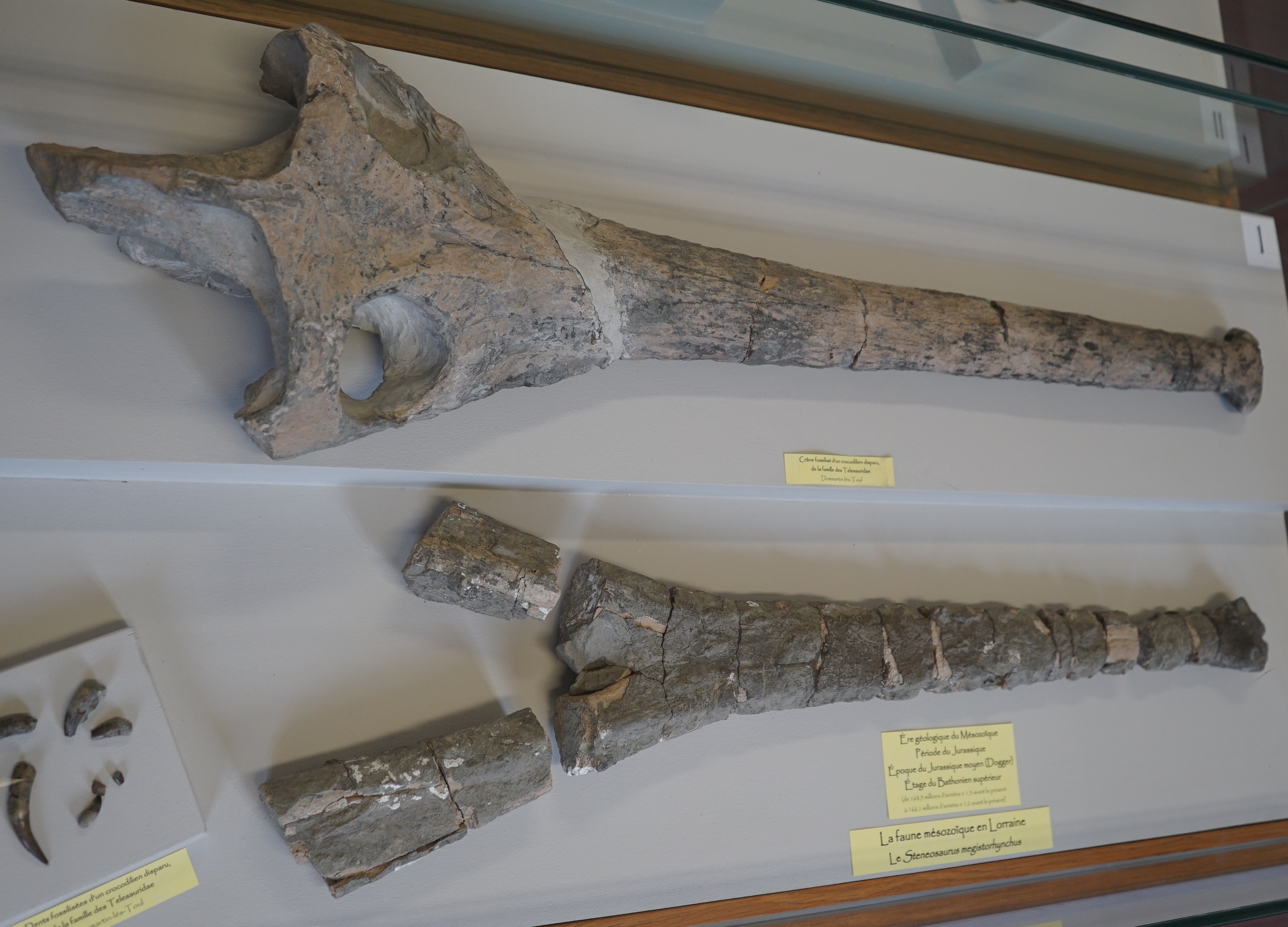 présenté au musée de TOul. Crane de Steneosaurus Megistorhyncus et d'un Teleosauridae .